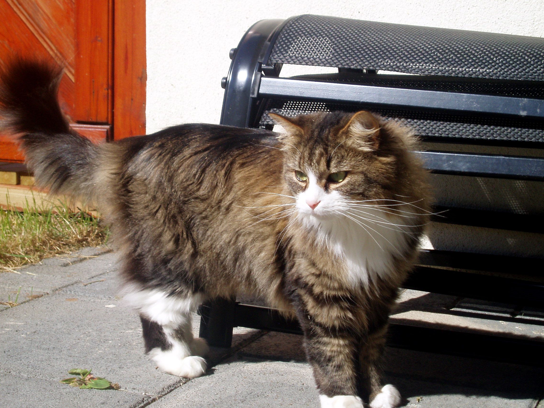 Truls? soldid lik honum :)